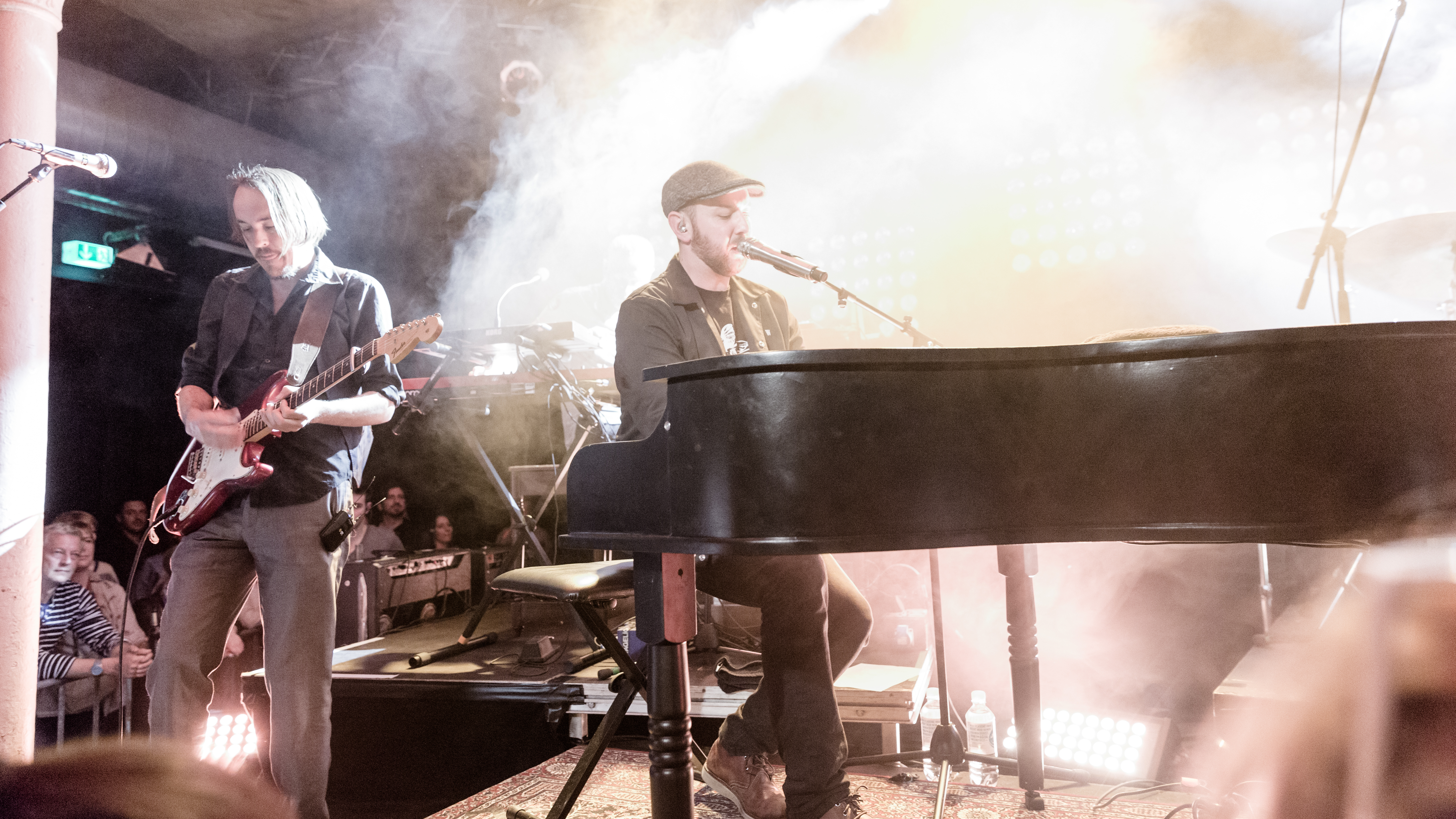 Matt Simons beim Konzert im Berliner Club Gretchen Berlin. Das Konzert fand am 25.04.2016 statt.